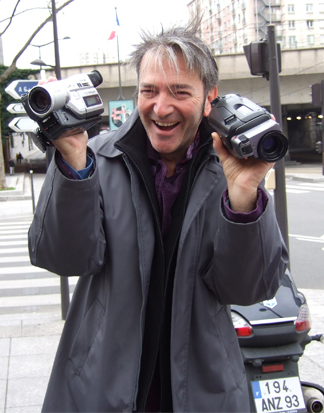 Portrait de Jean-Claude Mocik Vanves 2012